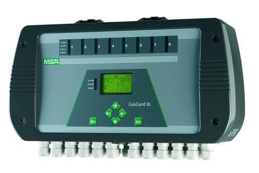 Gaswarnanlage GasGardXL